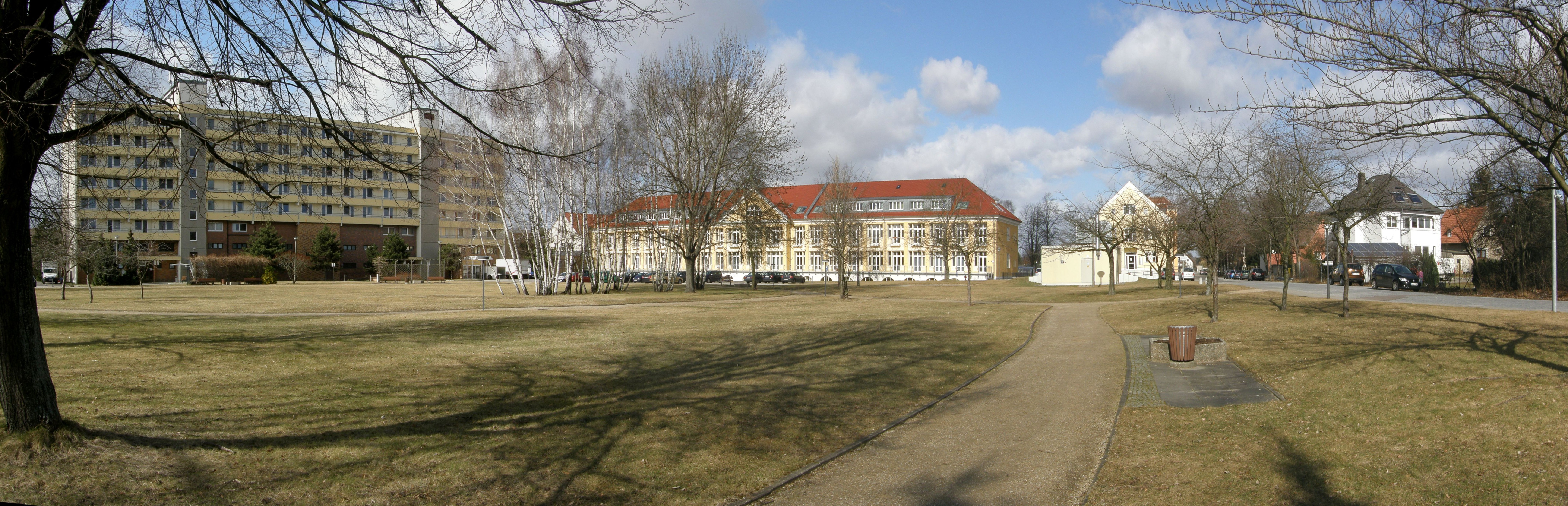 Alt-Kaulsdorf: Ansicht von Teilen des Vivantes Klinikums Hellersdorf /Krankenhaus Kaulsdorf